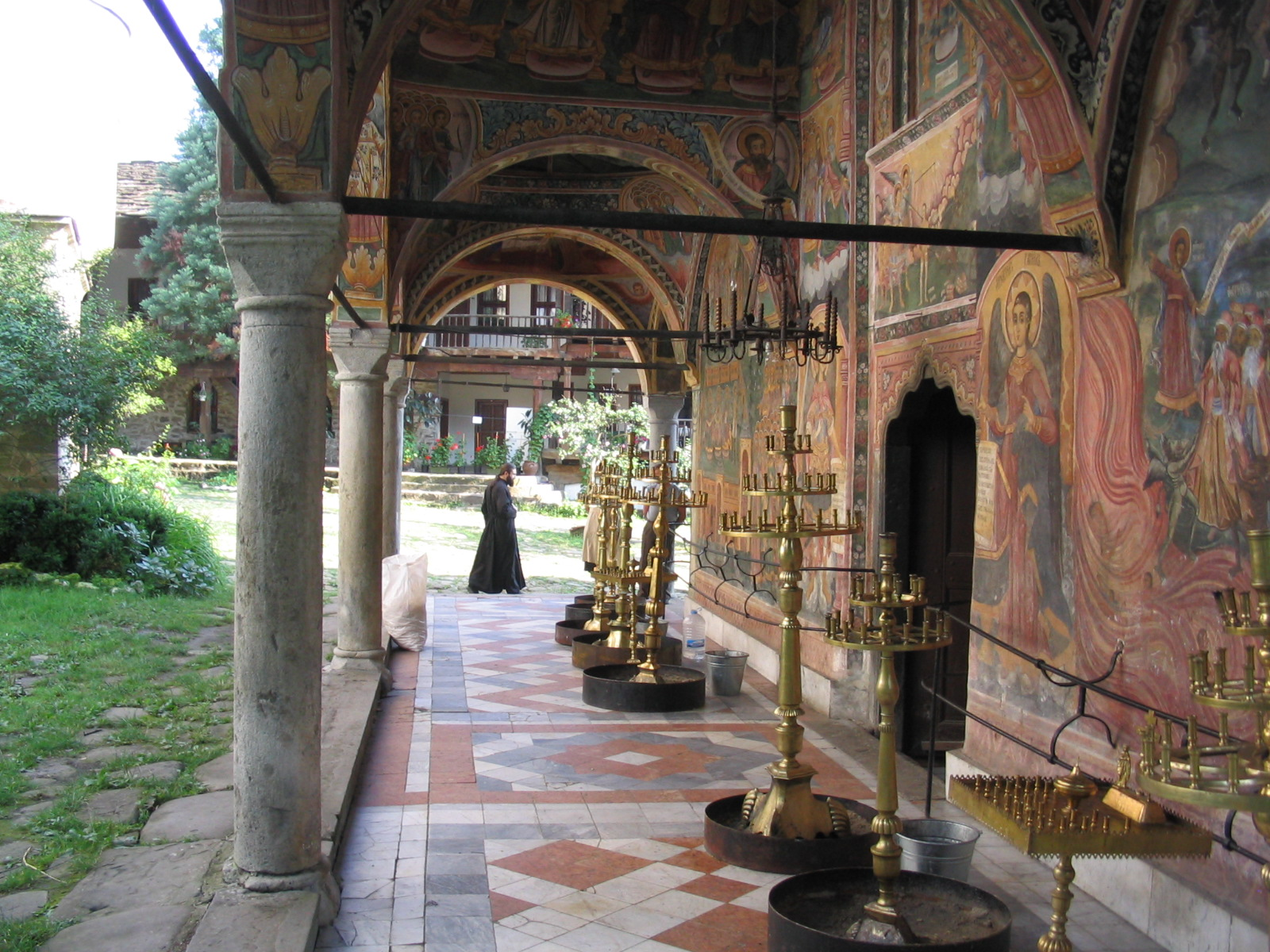 Eglise de la Sainte Vierge dans le monastère de Troyan